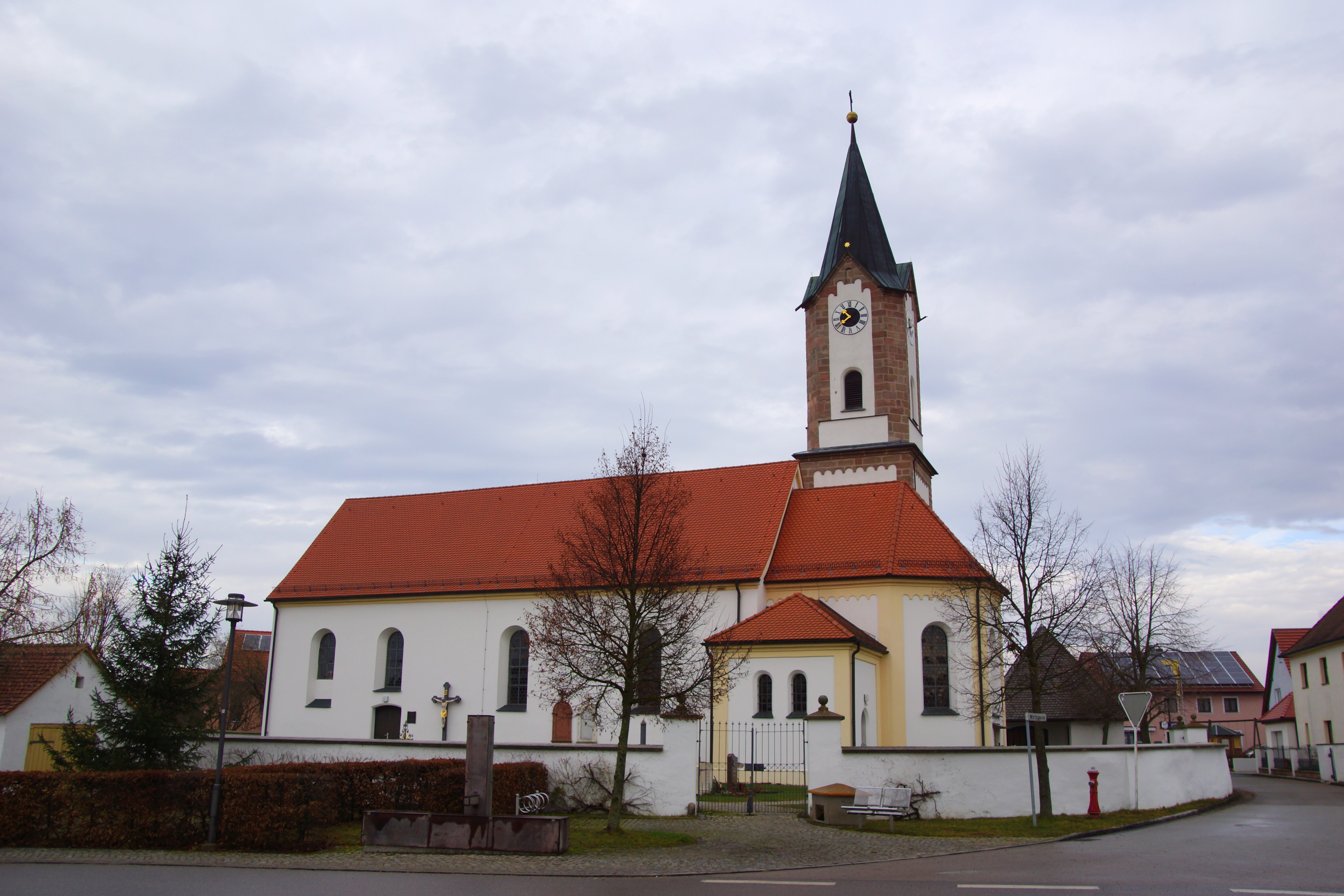 Die katholische Pfarrkirche St. Stephanus in Thannhausen